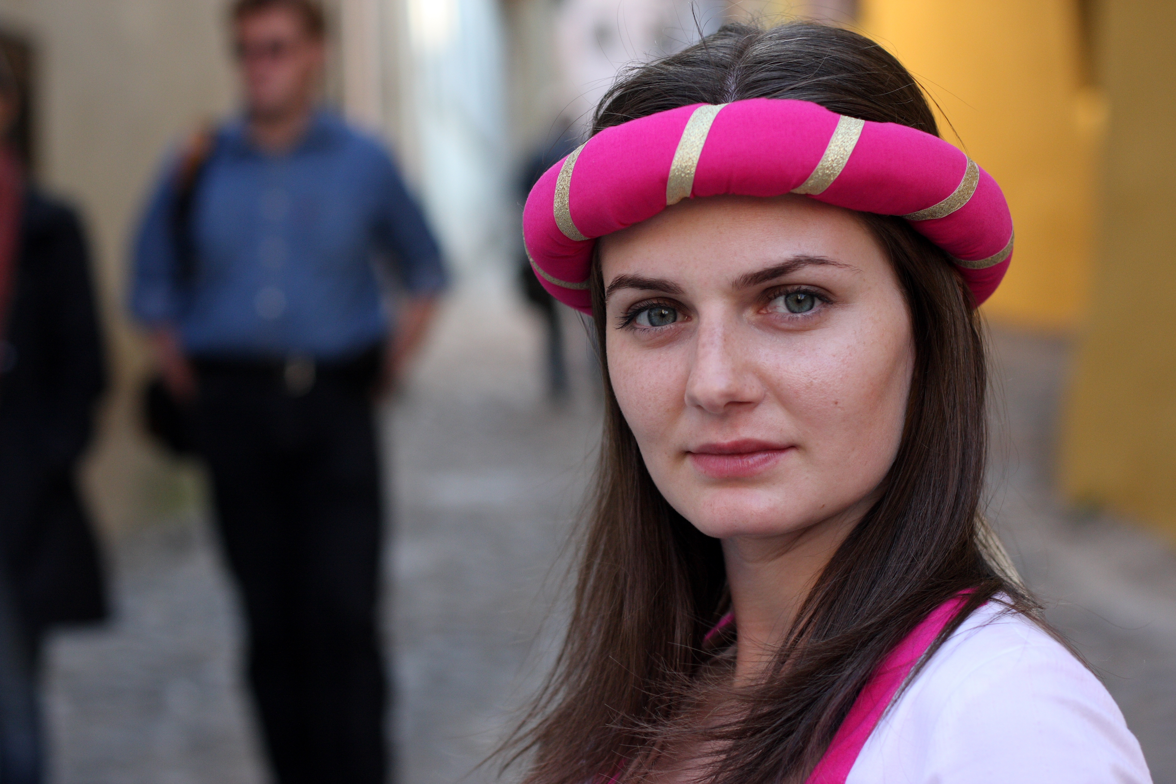 Sighisoara Citadel, Romania